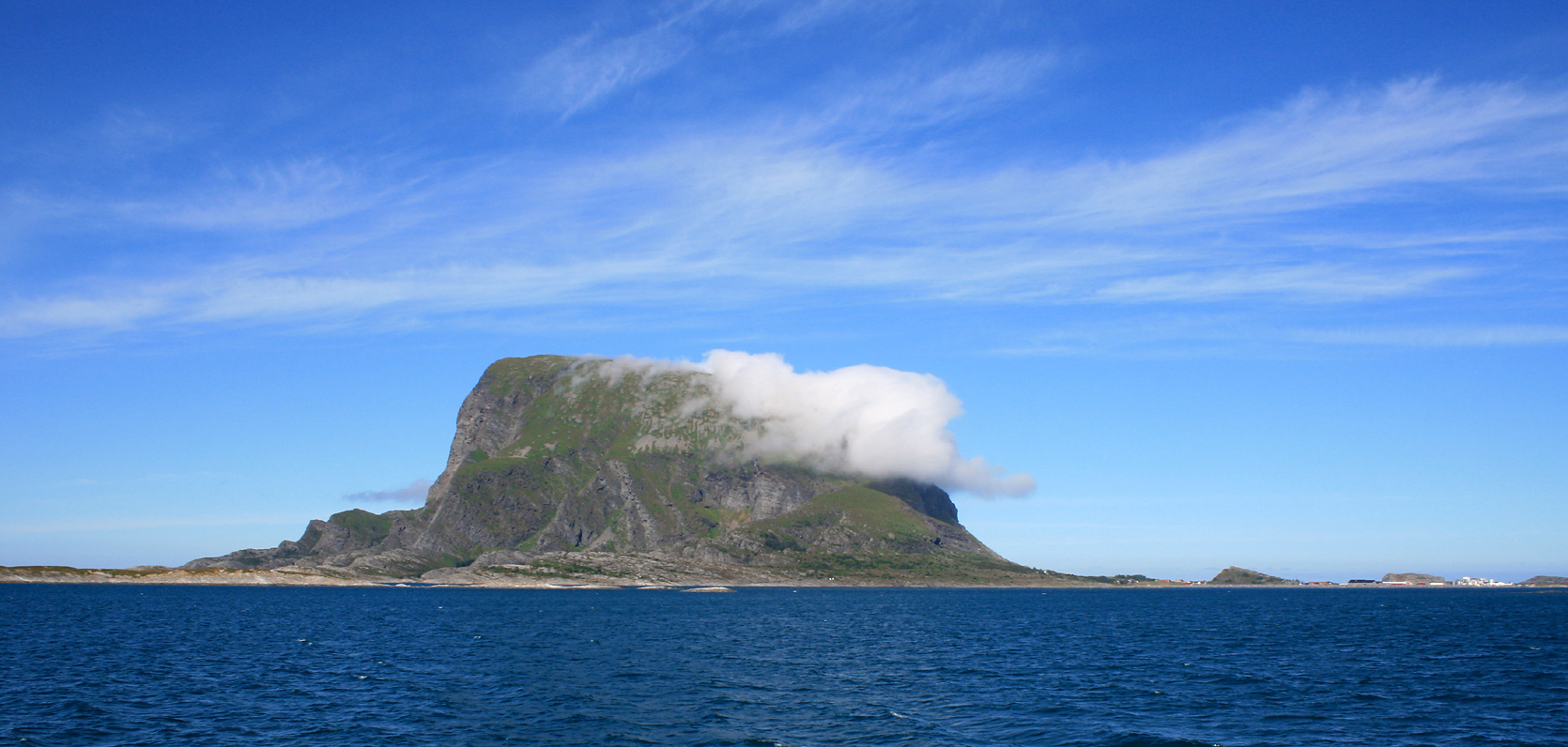 Lovund, Lurøy, Nordland, Norway.